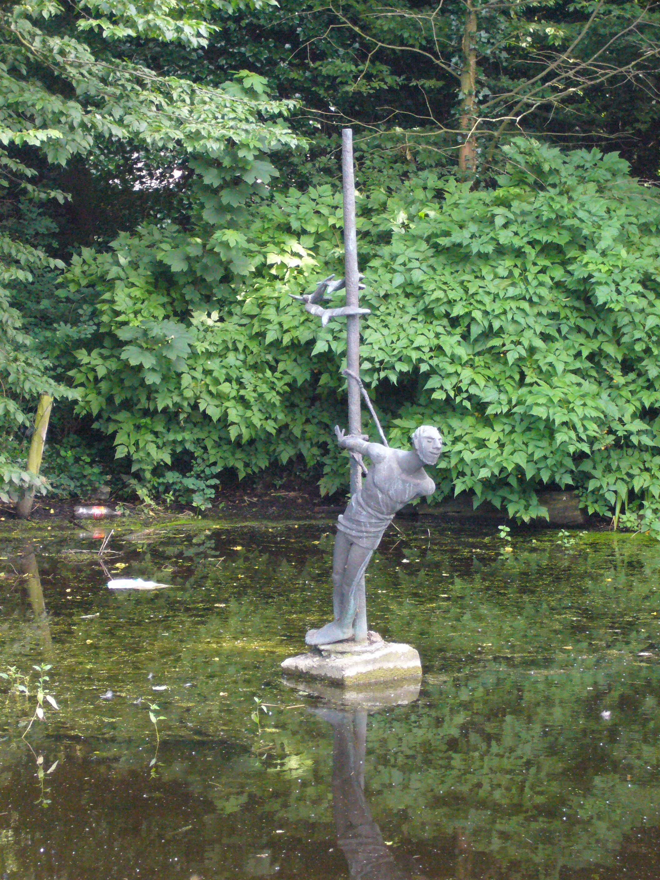 Odysseus, bronzen beeld in het Westbroekpark Sculpture in The Hague/The Netherlands